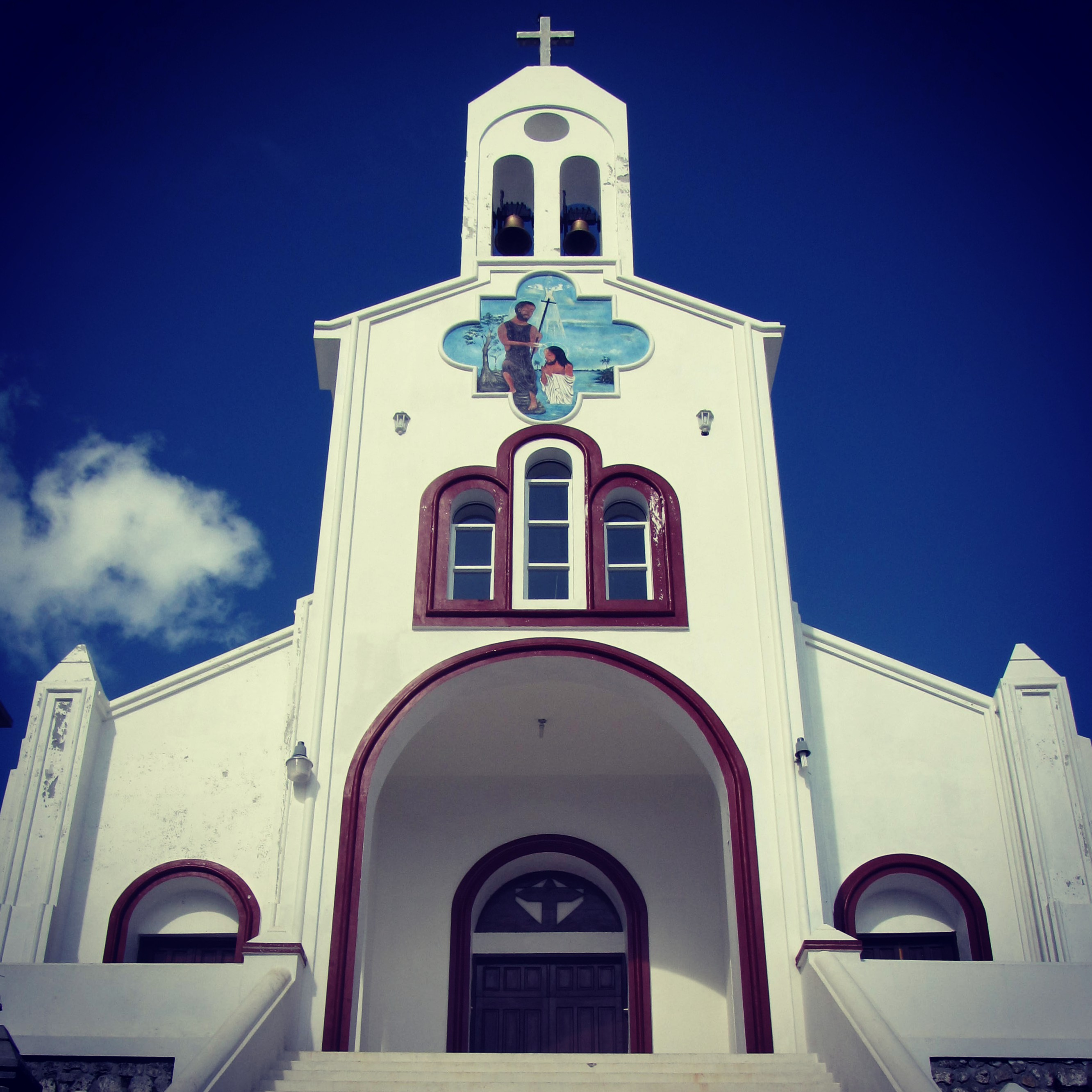 Eglise de Saint Jean Baptiste. La-Vallée-de-Jacmel Haïti